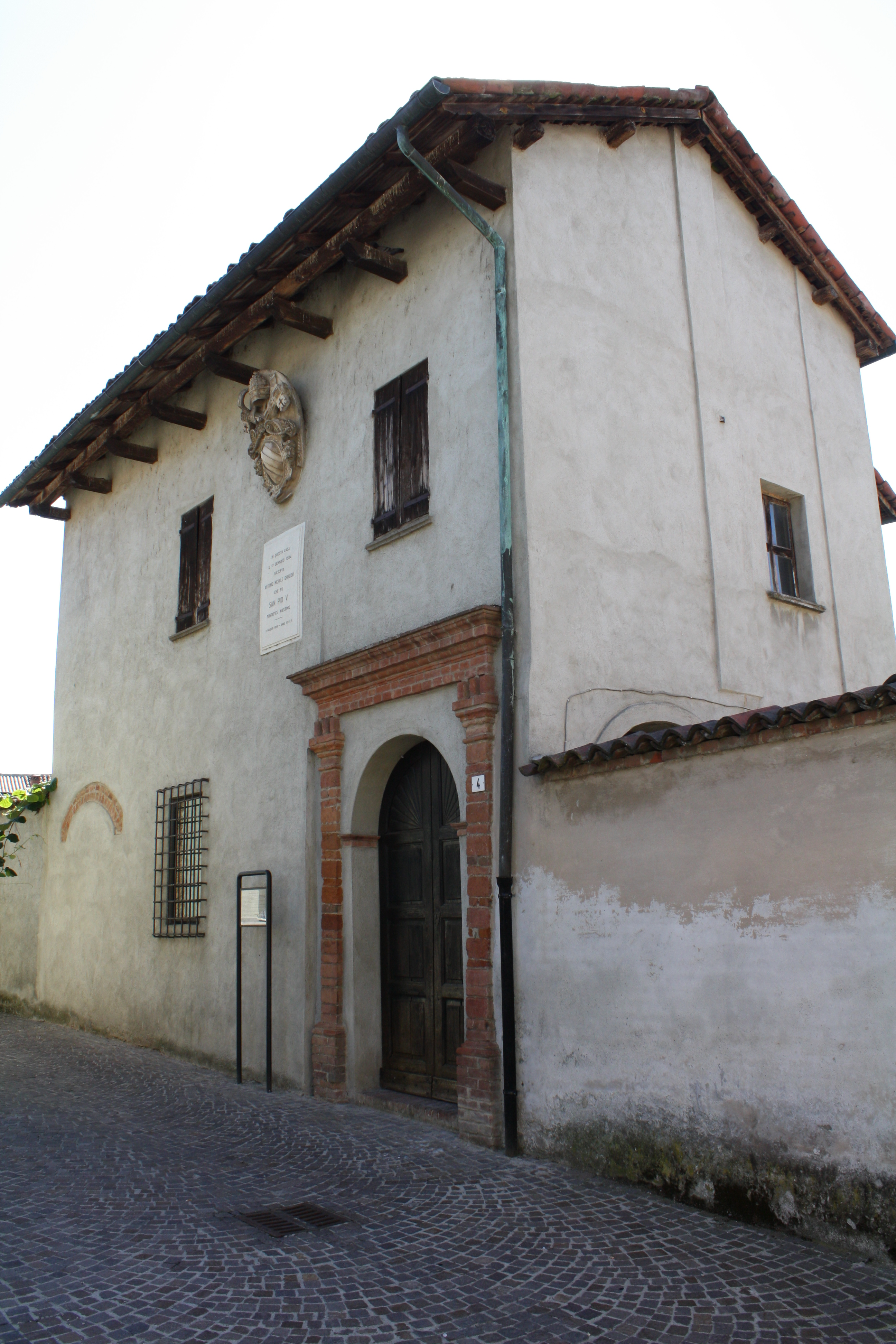 Bosco Marengo Casa Natale Pio V